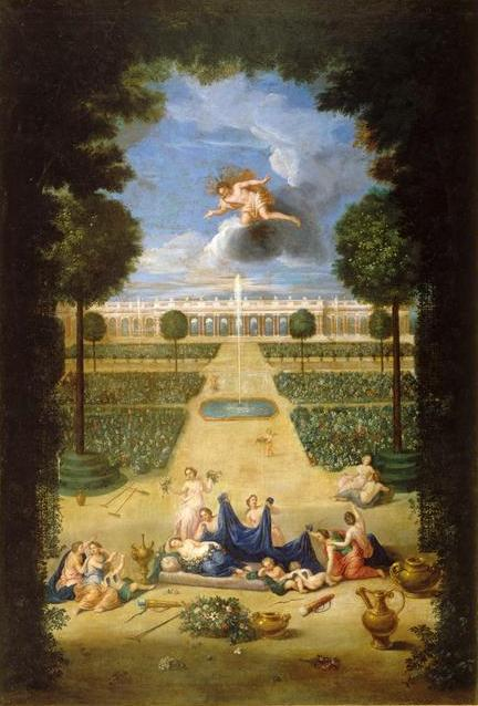 Vue du Grand Trianon prise des parterres